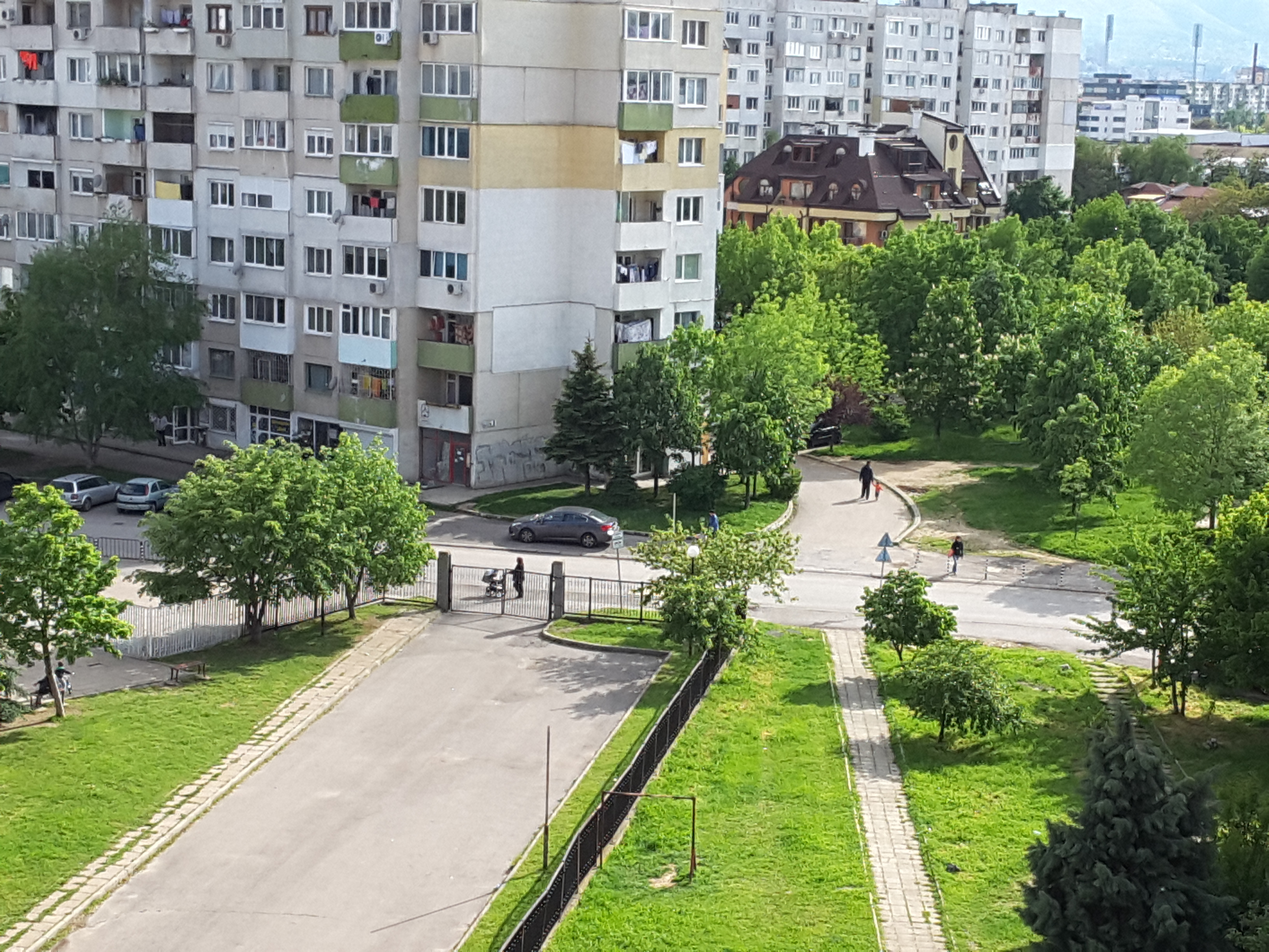 Двор на 199 ОУ